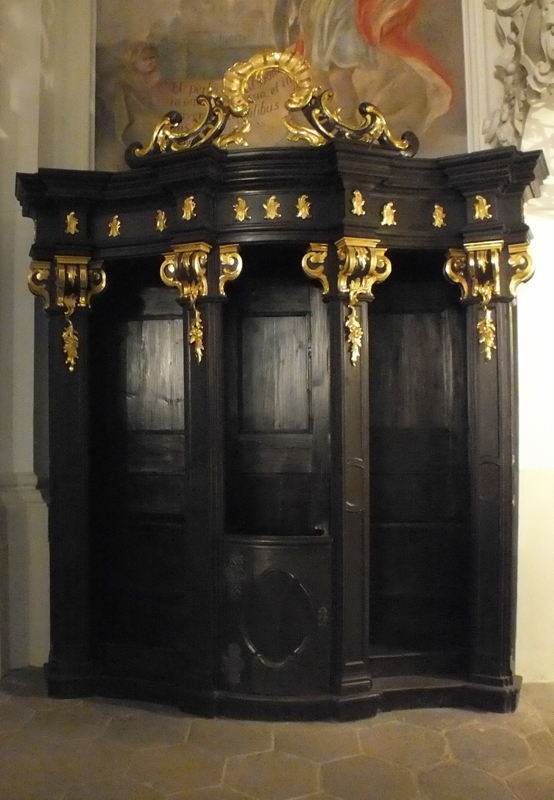 Krzeszów, bazylika, konfesjonał